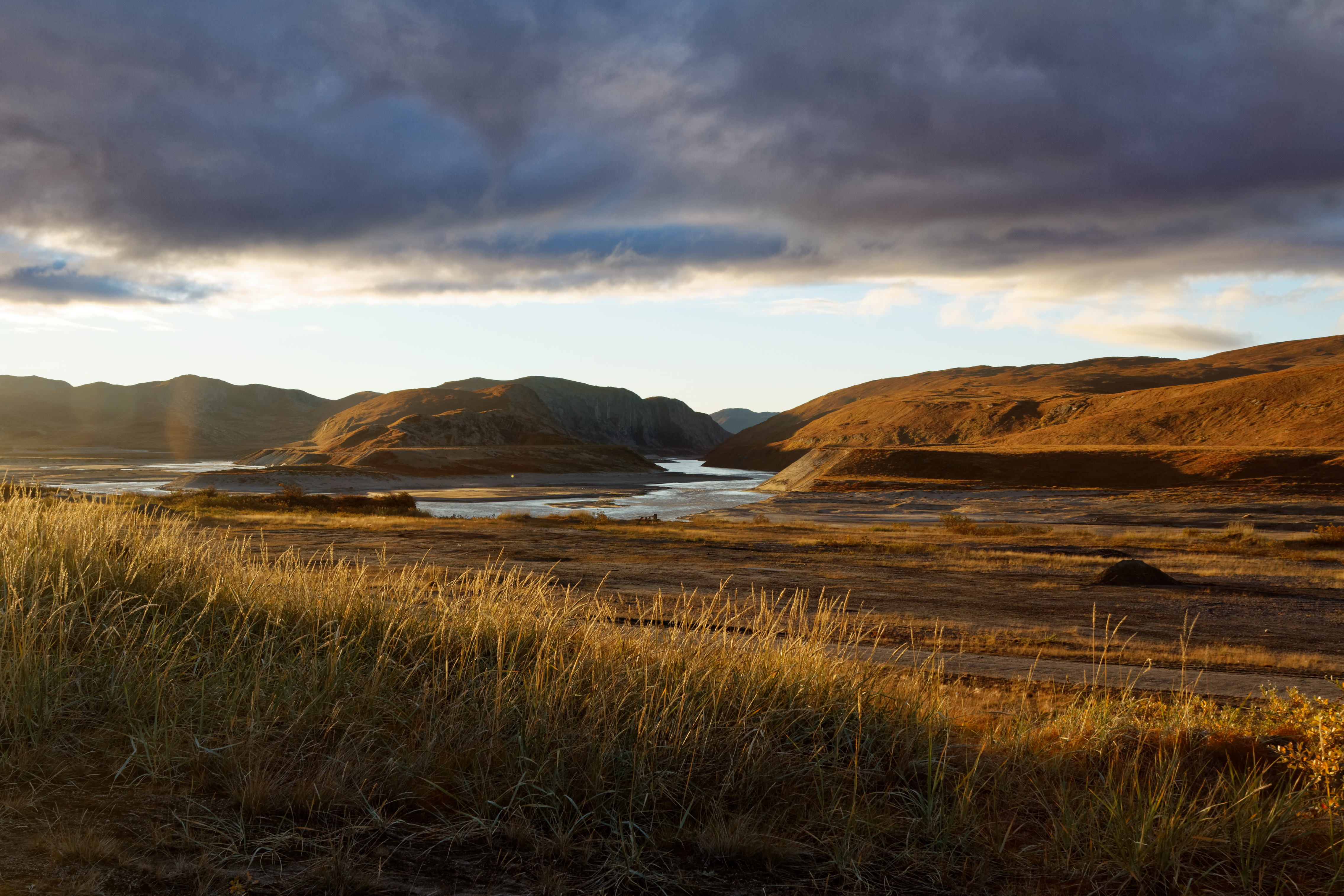 Kangerlussuaq